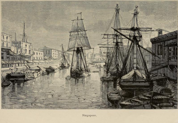 Arthur Mangin, Voyages et Découvertes outre-mer au XIXe siècle, illustrations par Durand-Brager, 1863 ː Singapour.